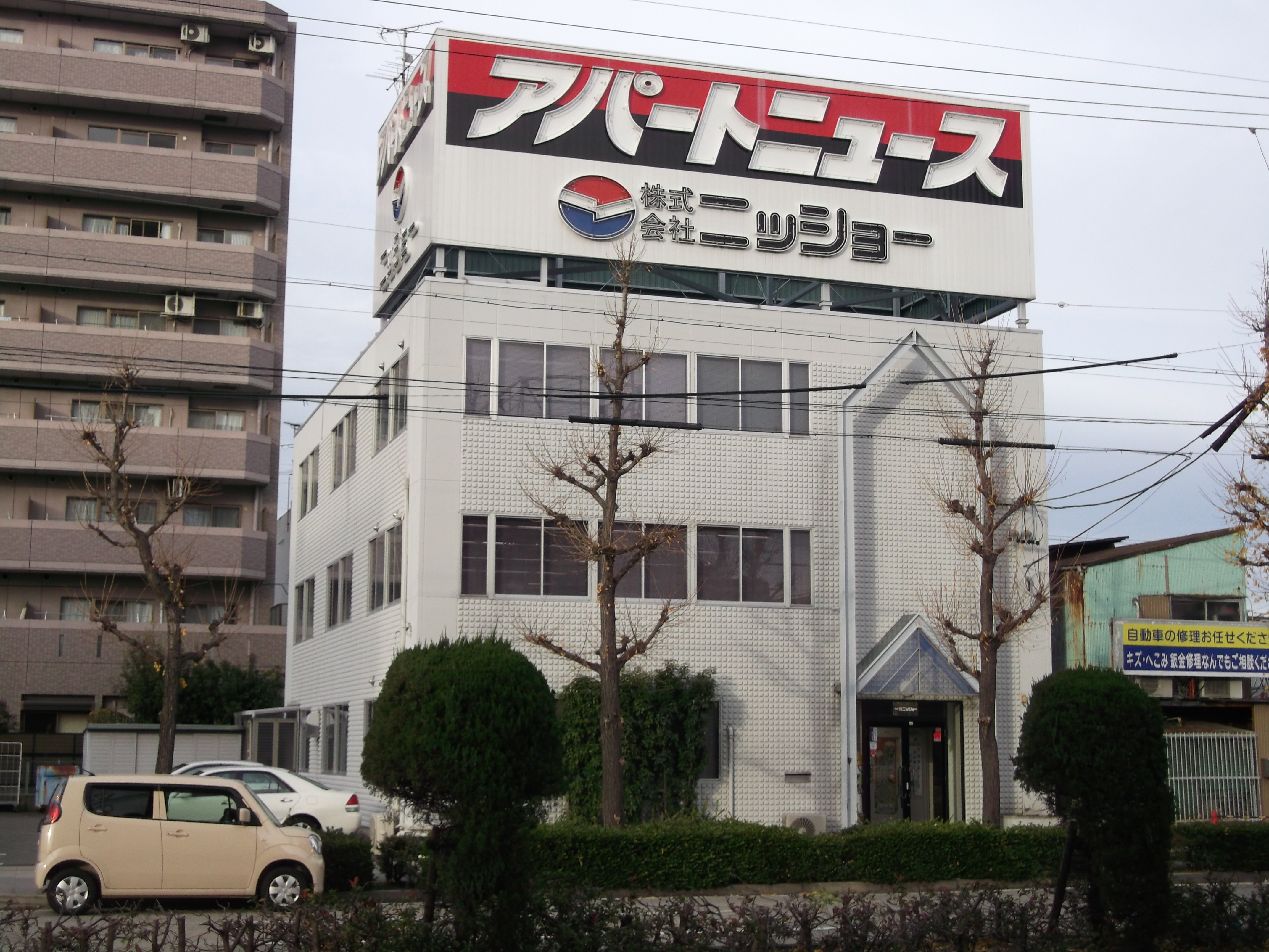 名古屋市北区城見通のニッショー本社を南側から写す